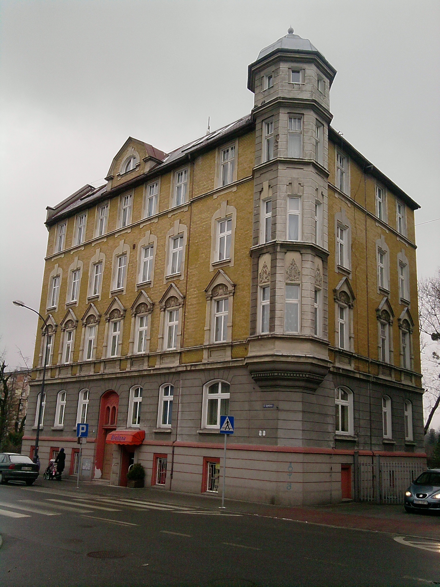 Kamienica przy ul. Ogrodowej 30